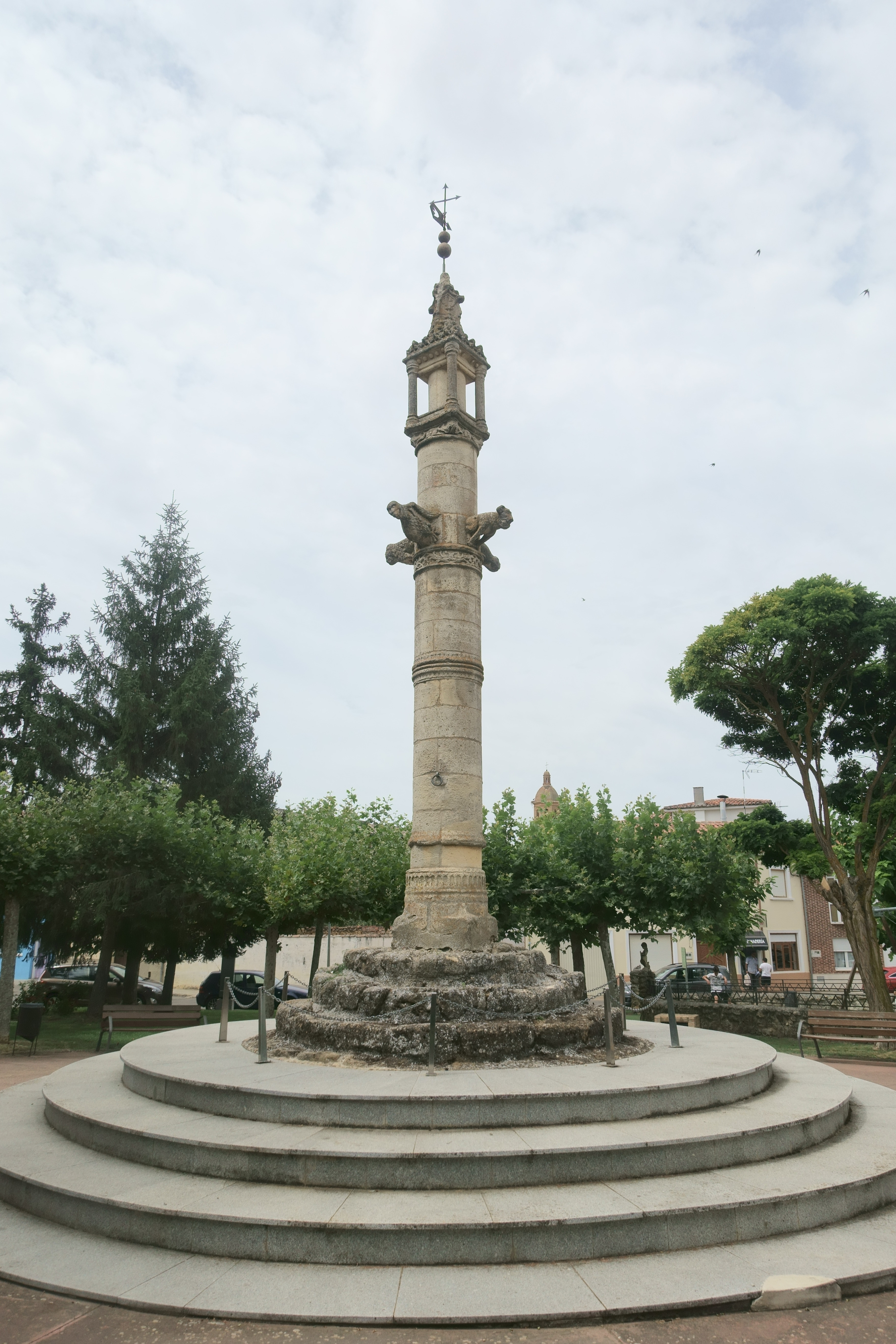 Rollo jurisdiccional de Mayorga (Valladolid, España).